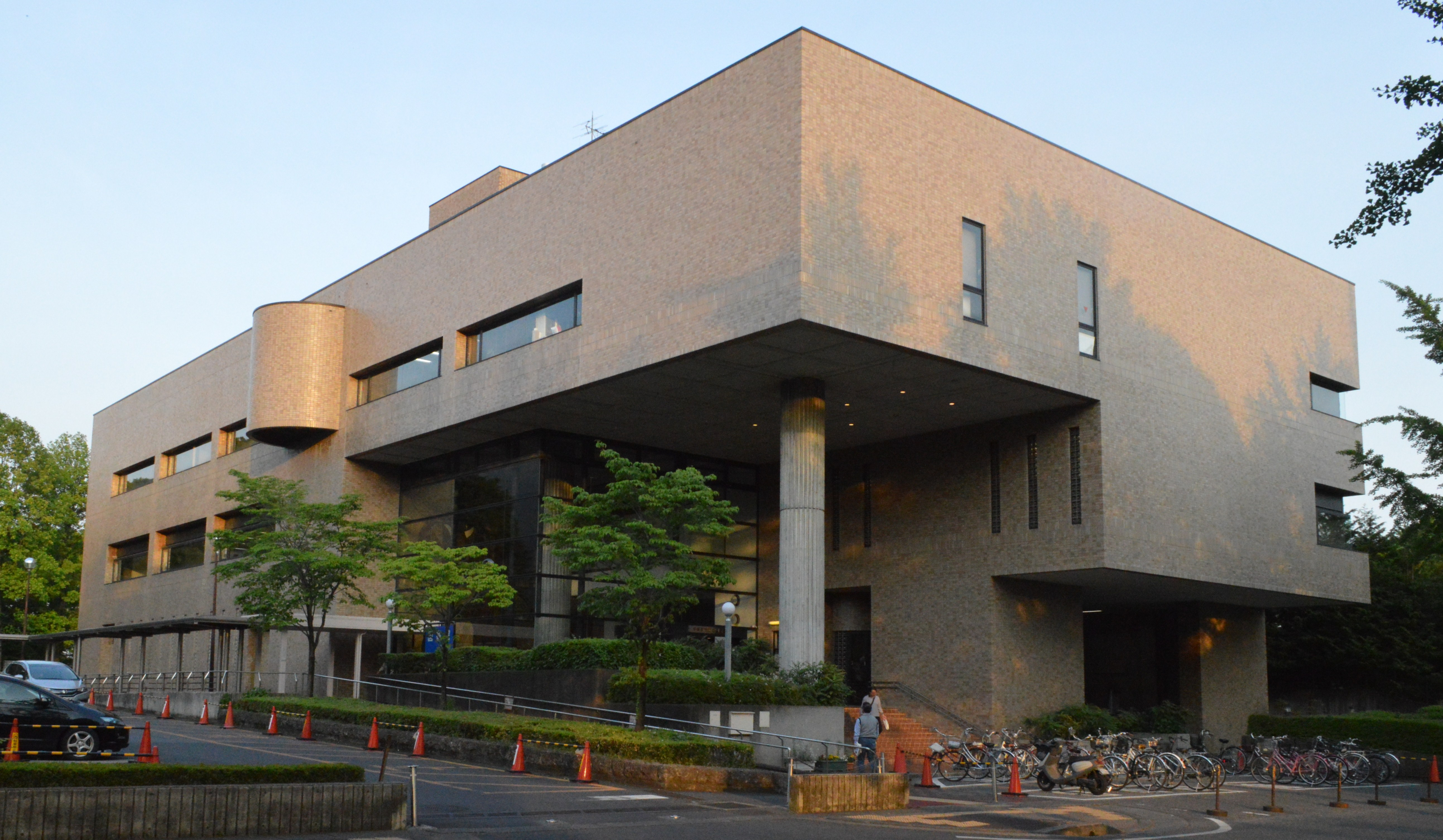 宇都宮市立図書館の本館である宇都宮市立中央図書館